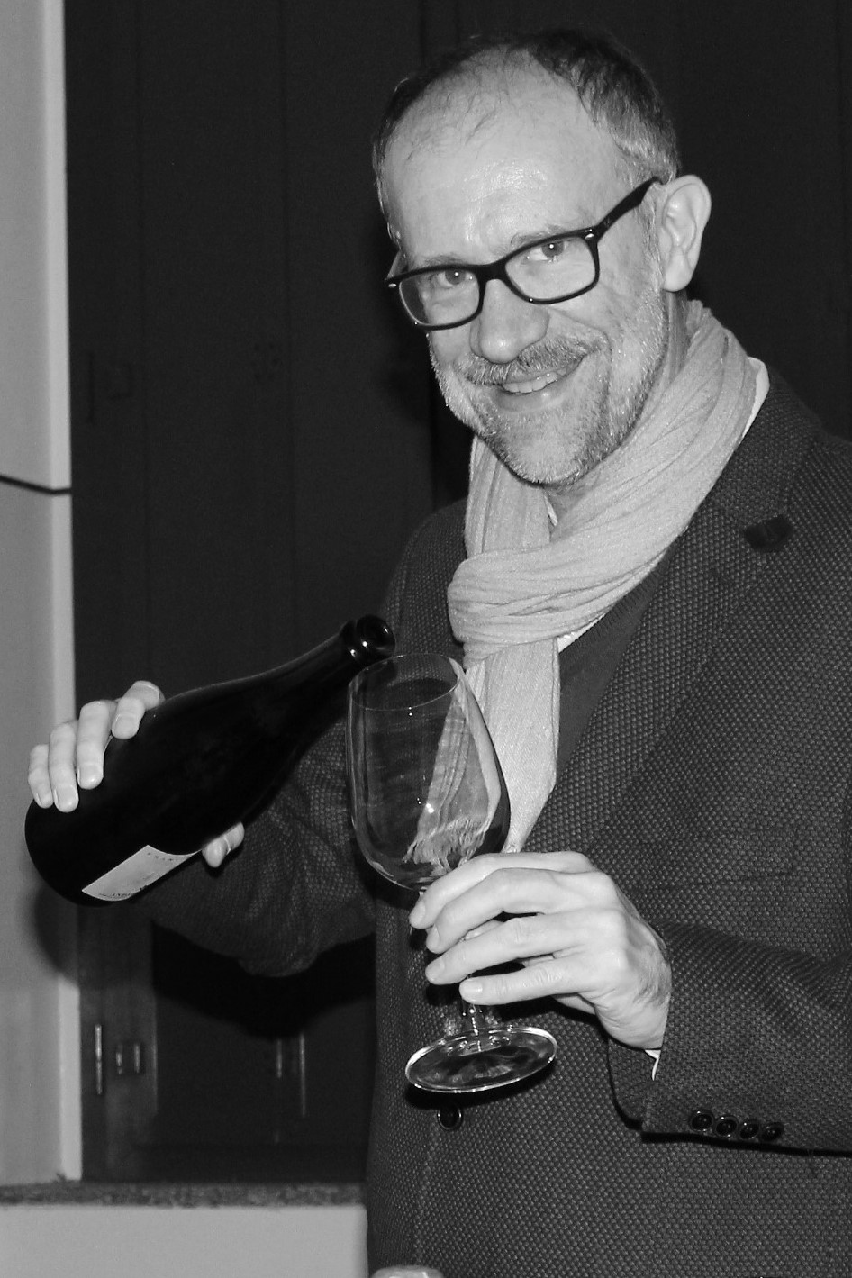 Massimo Zanichelli presenta il suo documentario "Generazione Barolo" con la degustazione dei relativi vini a Paullo, 8 novembre 2018